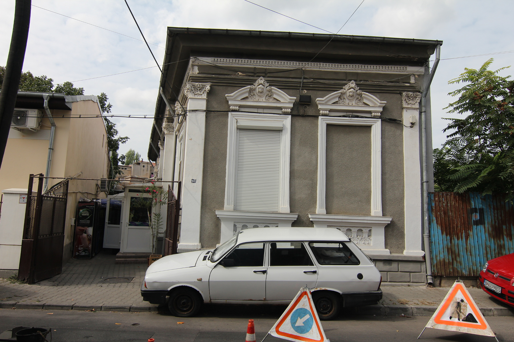 Casă pe Str Romulus